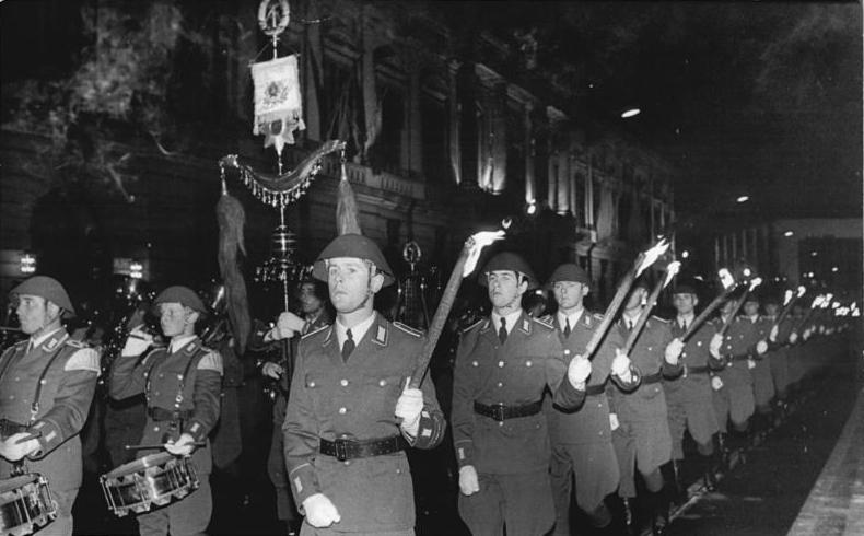 Berlin, 25. Jahrestag DDR-Gründung, Zapfenstreich ADN-ZB Franke 5.10.74 Berlin: 25. Jahrestag-Großer Zapfenstreich der NVA -Ein Zapfenstreich der Nationalen Volksarmee fand am Abend des 5.10.74 vor dem Mahnmal für die Opfer des Faschismus und Militarismus statt. Eine Ehrenformation der NVA marschierte vom Alexanderplatz kommend zum Mahnmal, um dort Aufstellung zu nehmen.